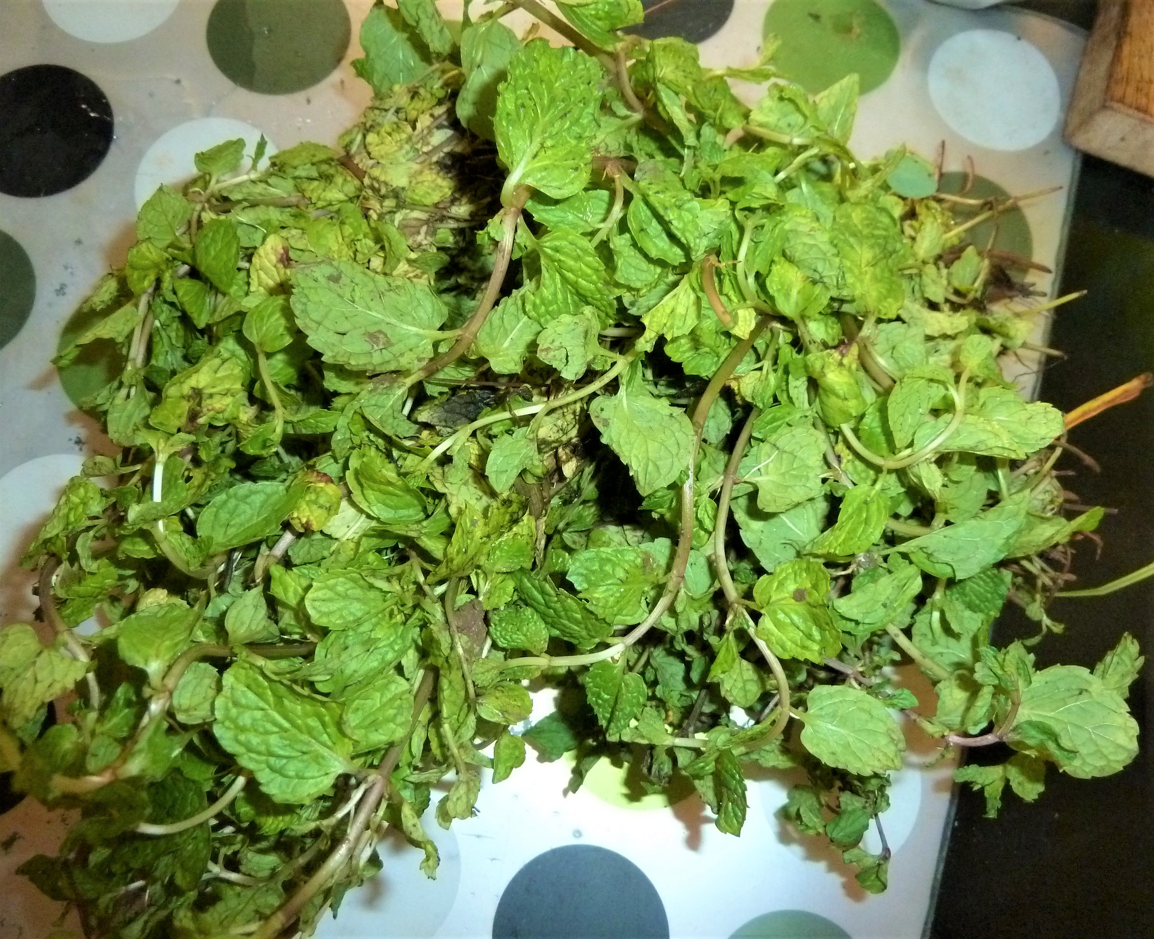 పుదీనా కట్ట